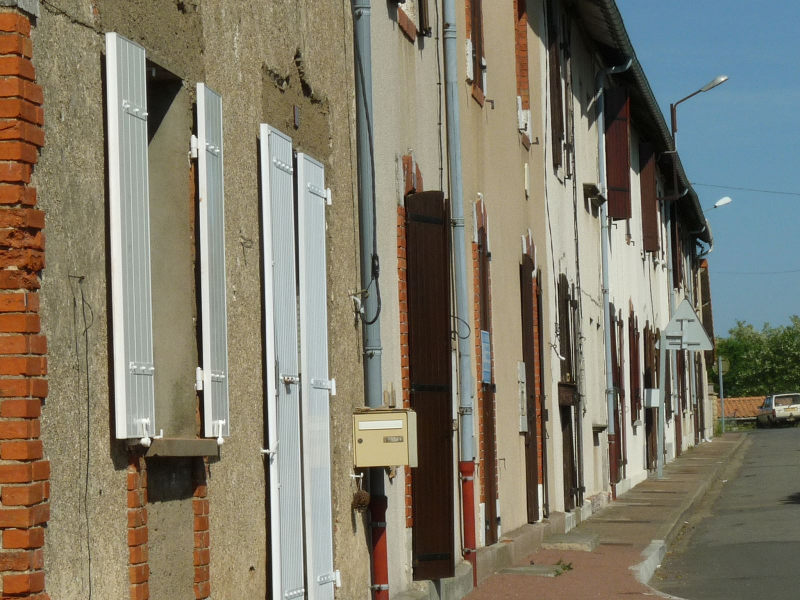 maisons ouvrières à Roumazières, Charente, France